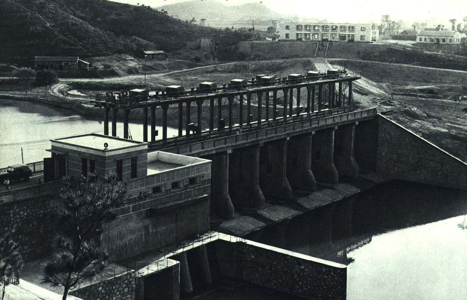 1965-6 1965年 东江深圳水利工程 塘头厦